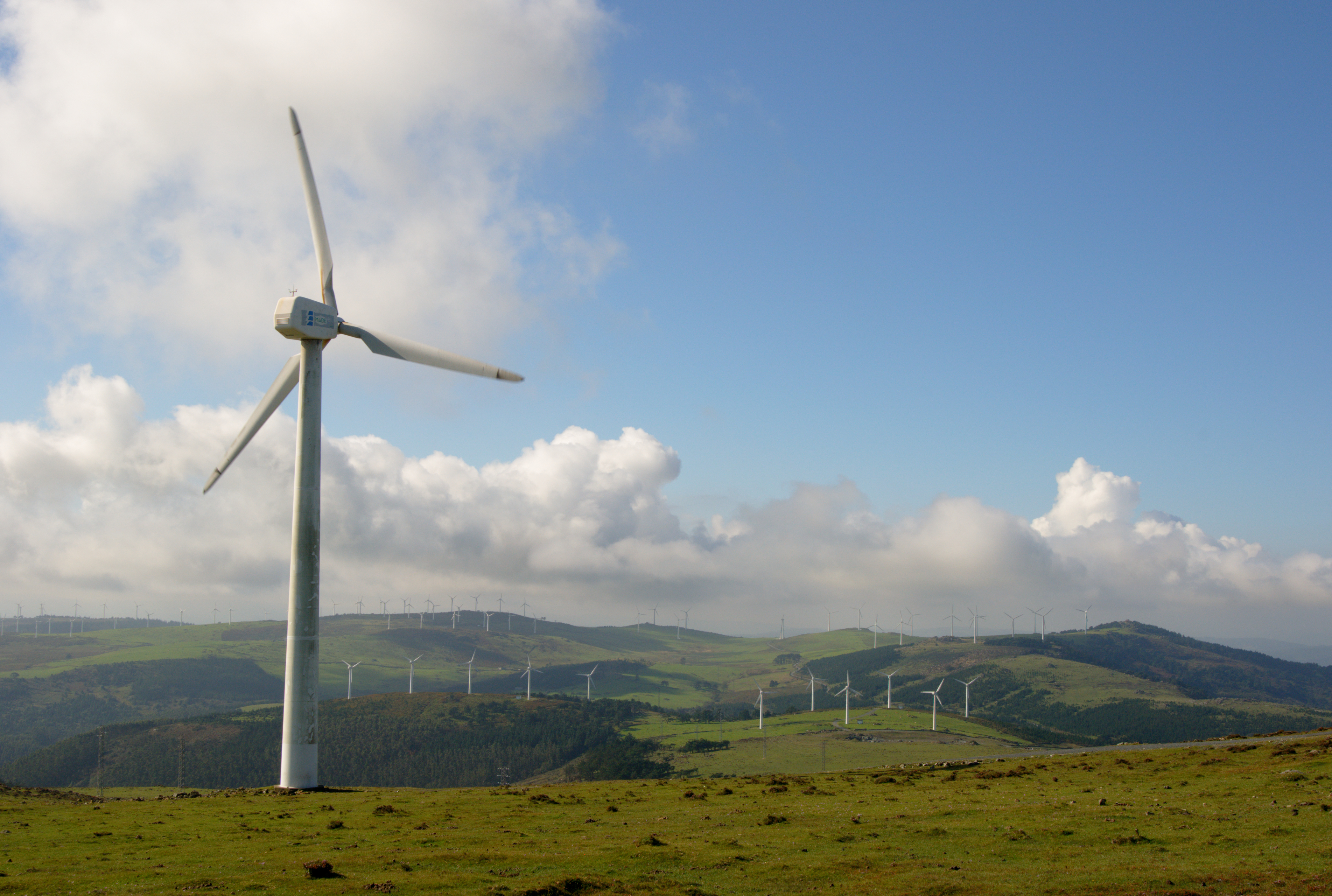 Landschaft auf der Serra da Capelada, Blick von der Garita de Herbeira